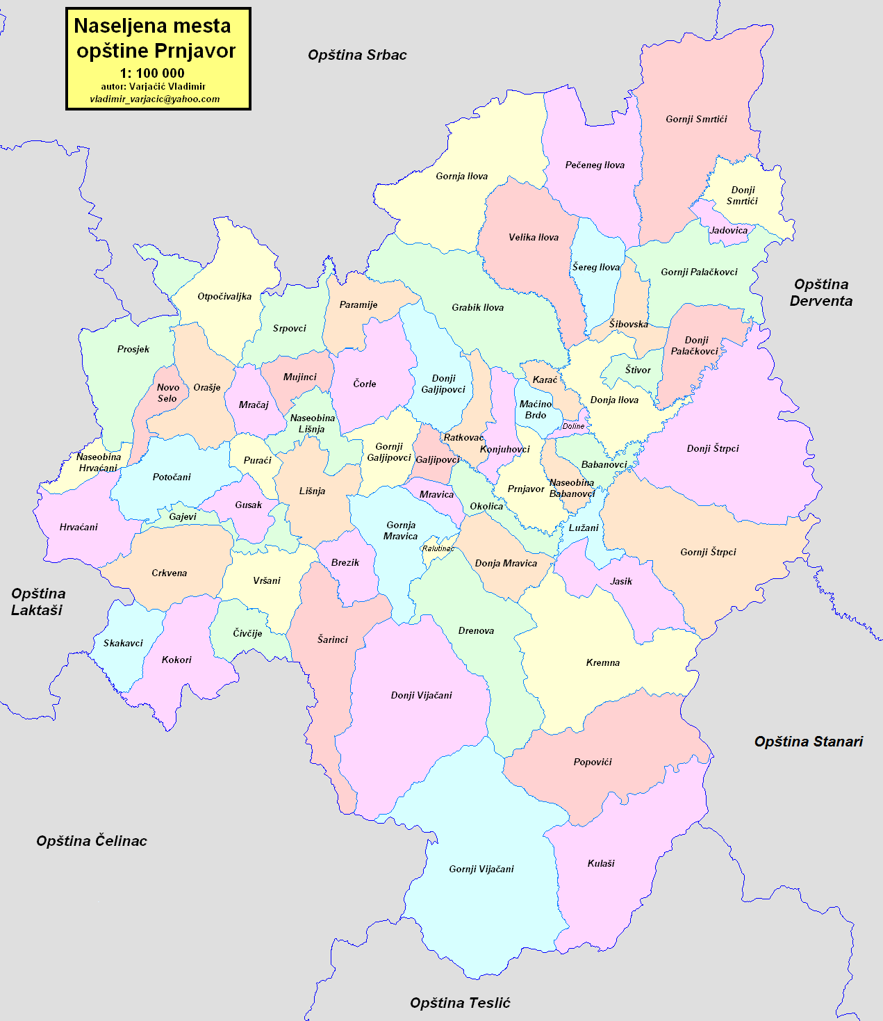 Opština Prnjavor